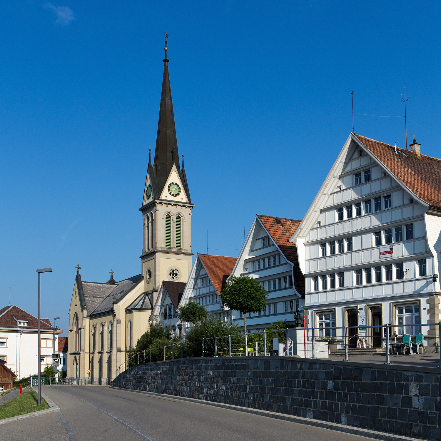 Dorfkern von Rehetobel (AR) mit reformierter Kirche